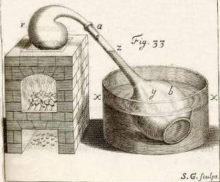 Appareil de Stephen Hales pour mesurer les volumes de gaz produits ou consommés lors d'une réaction dans une cornue r (retorte)